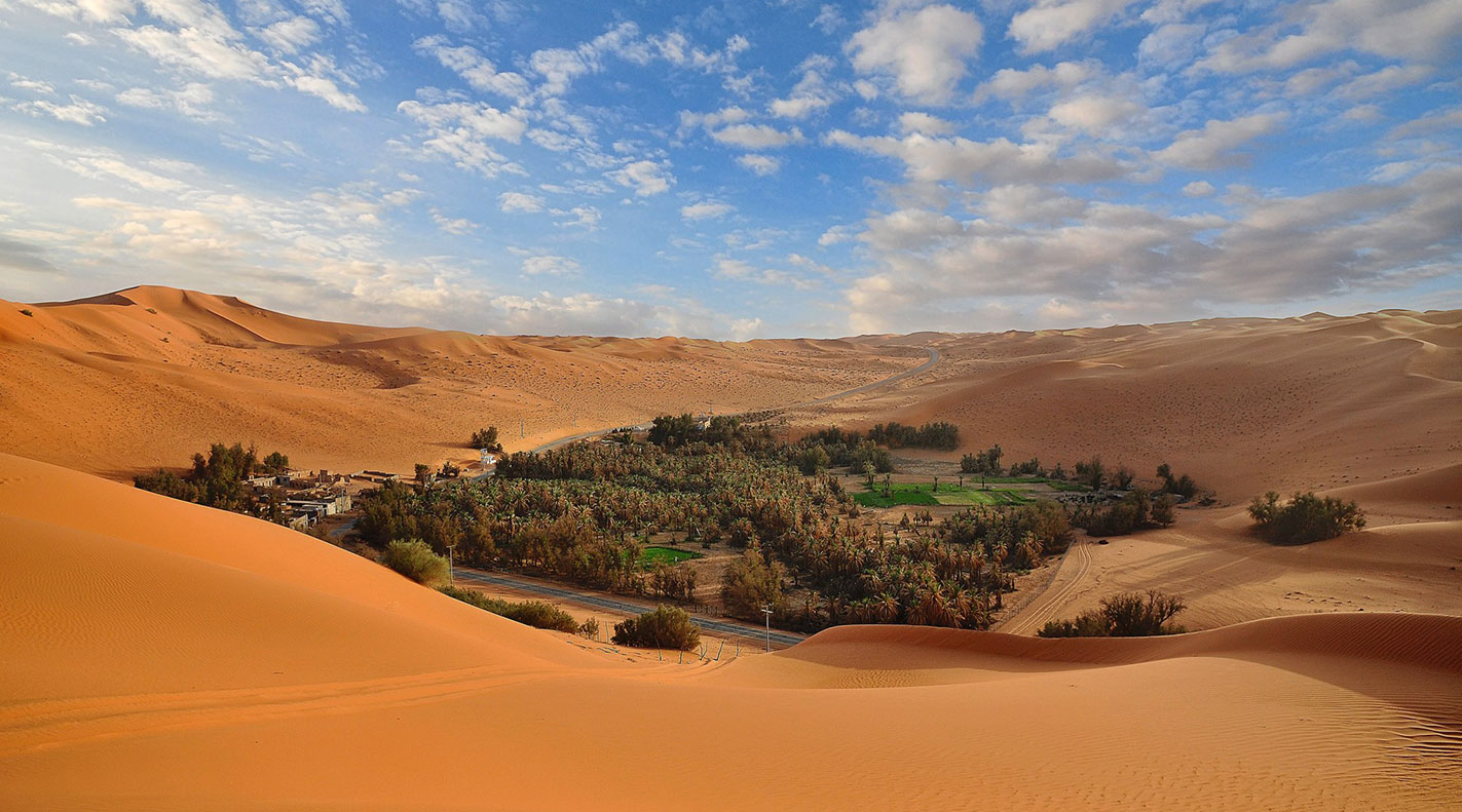 واحة في وسط منطقة الرياض